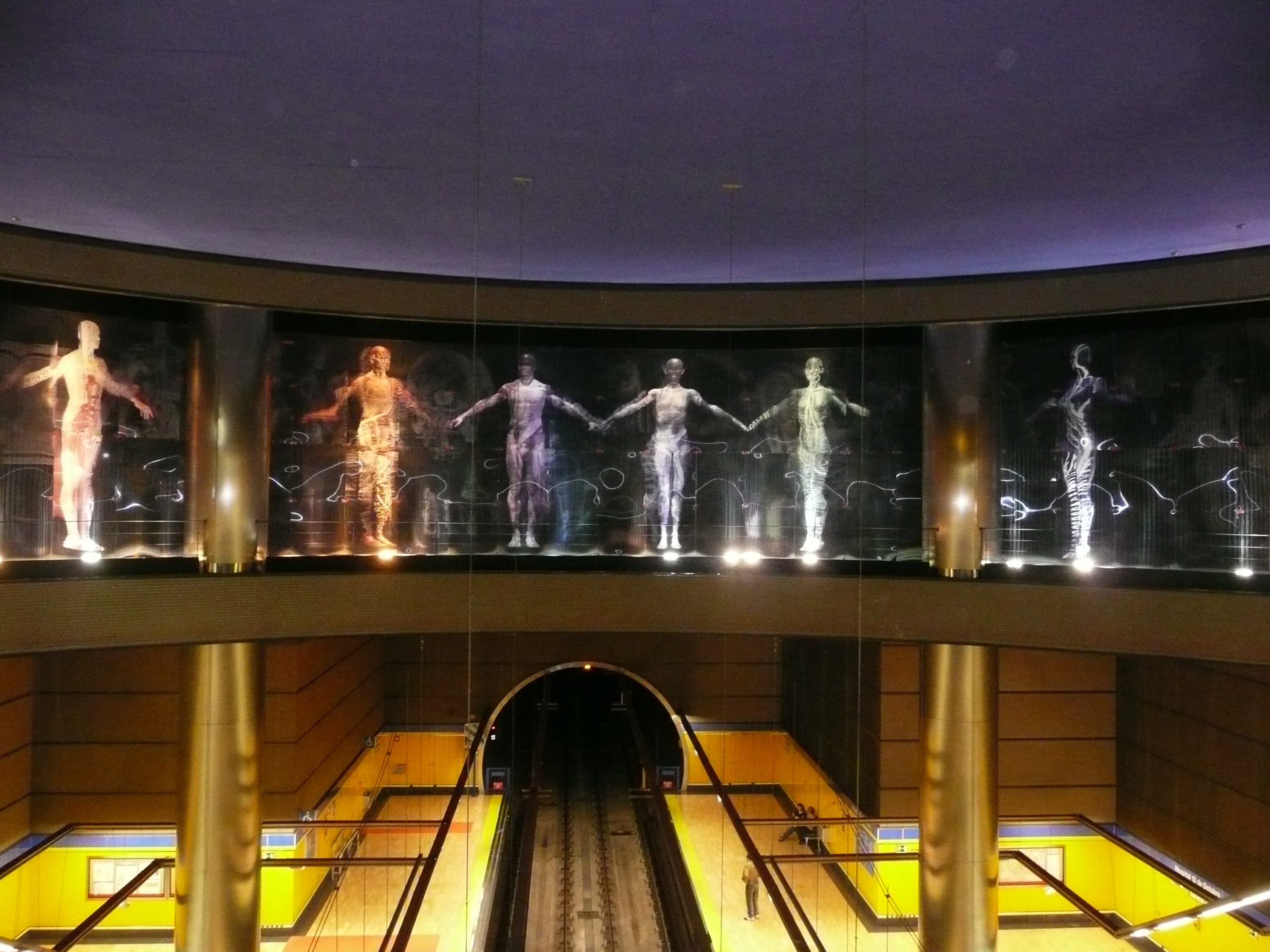 Mural cerámico obra de Alfar del Monte en colaboración con el "Estudio Sardá", autores de un conjunto de murales cerámicos en varias estaciones del metro en la Comunidad de Madrid. En este caso, en la estación Hospital 12 de Octubre.